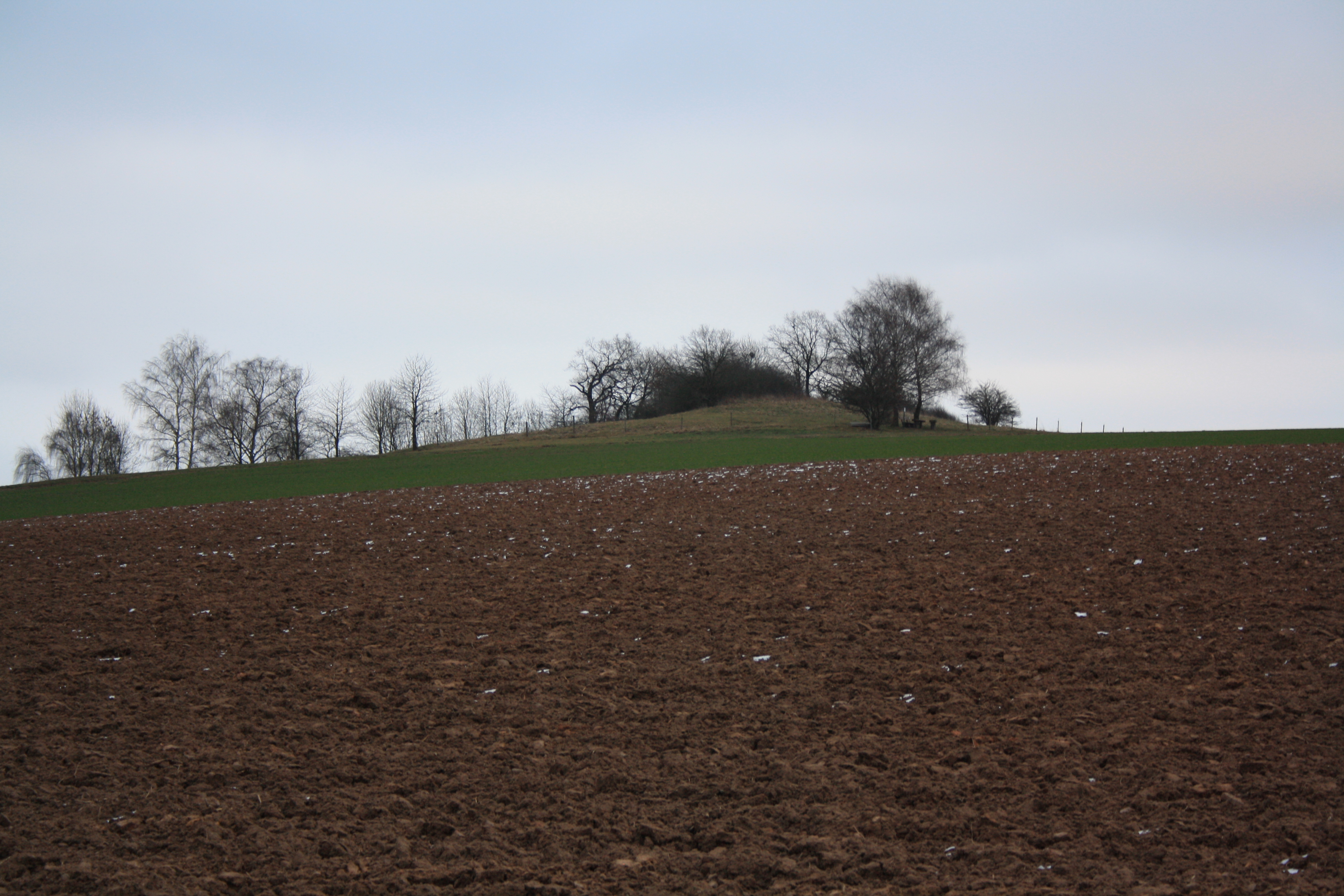 Motzküppel, aus westlicher richtung gesehen